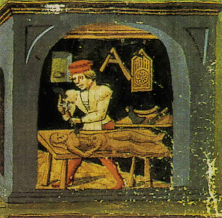 De spherae, bottega dello scultore, 1480-1490, modena biblioteca estense lat 209 c. 10r